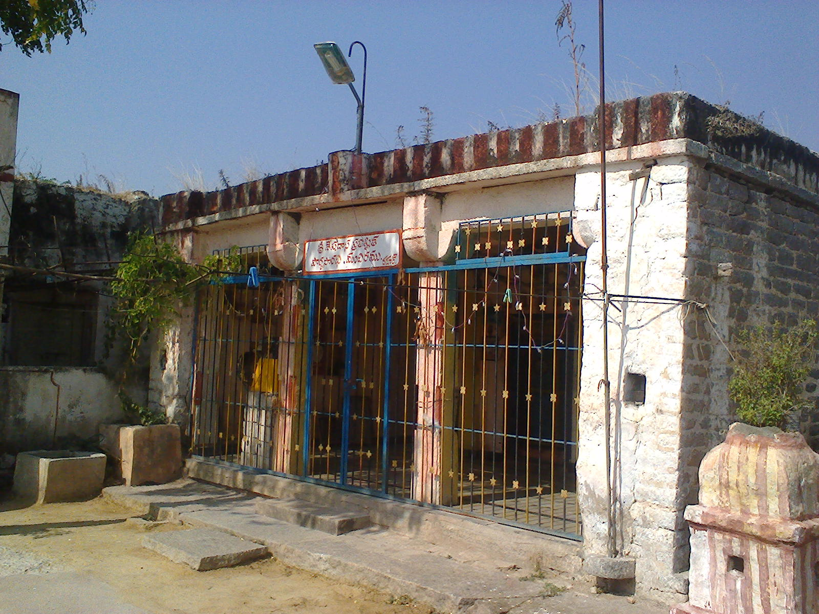 Sri Parthasarathi Temple